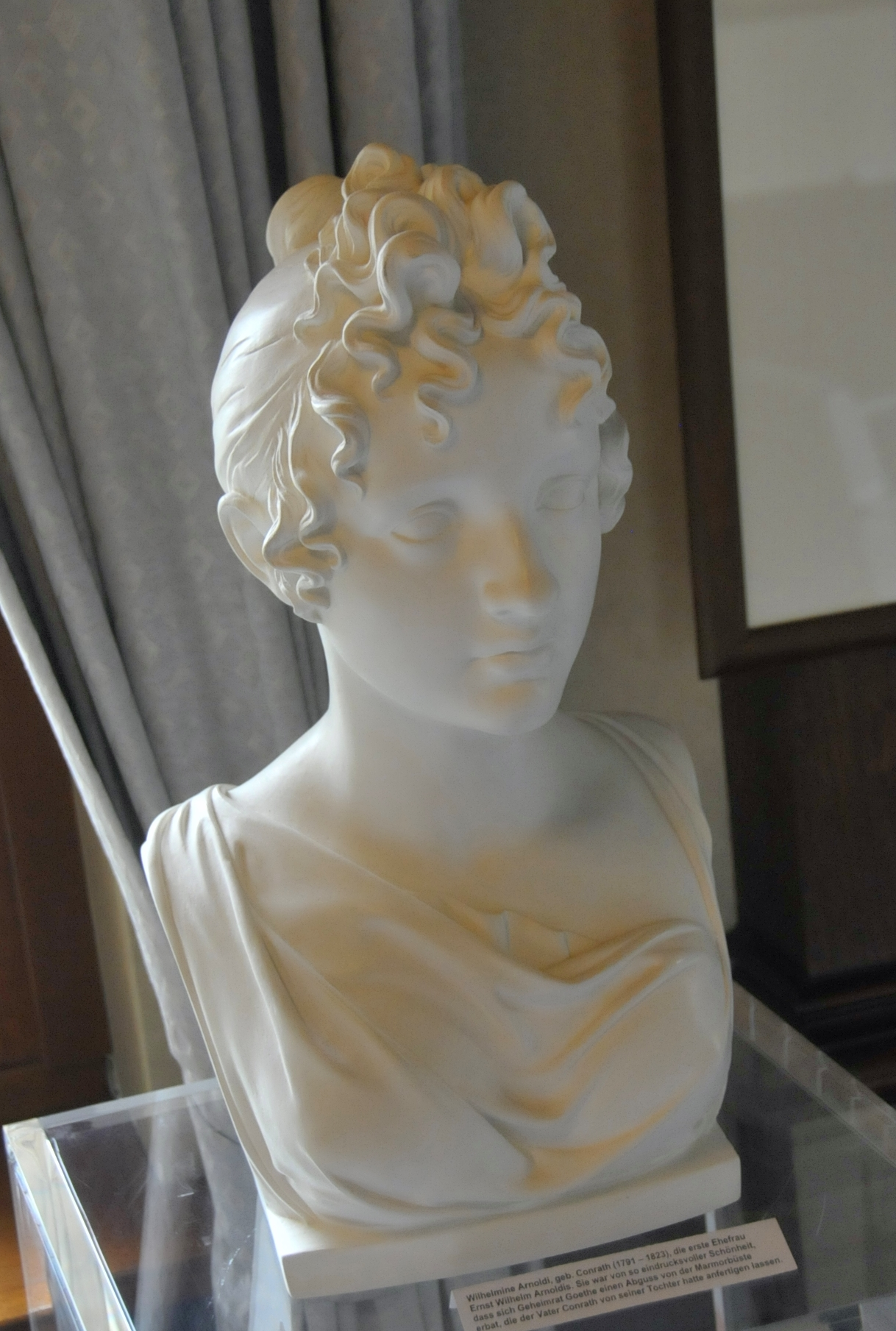 Porträtbüste von Wilhelmine Arnoldi, der ersten Frau Ernst-Wilhelm Arnoldis